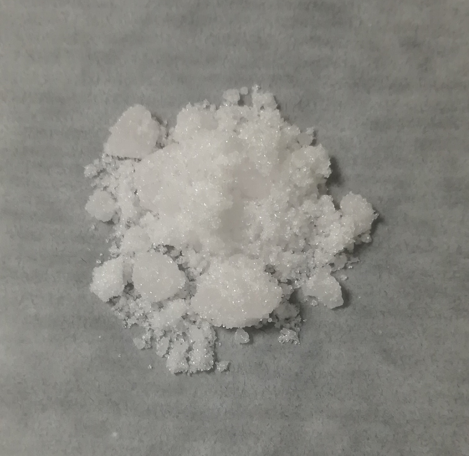 中文（中国大陆）: 硝酸铕六水合物（99.99%），CAS 10031-53-5。